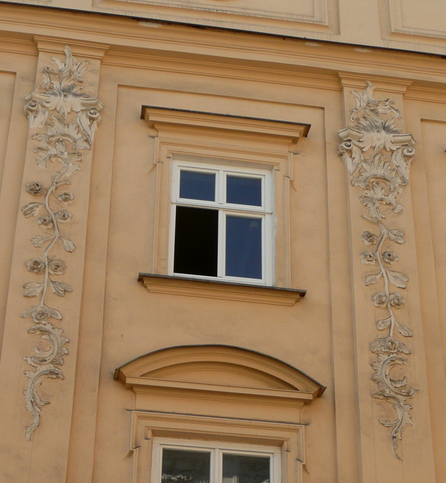 Kamienica, zbliżenie okna. Kraków